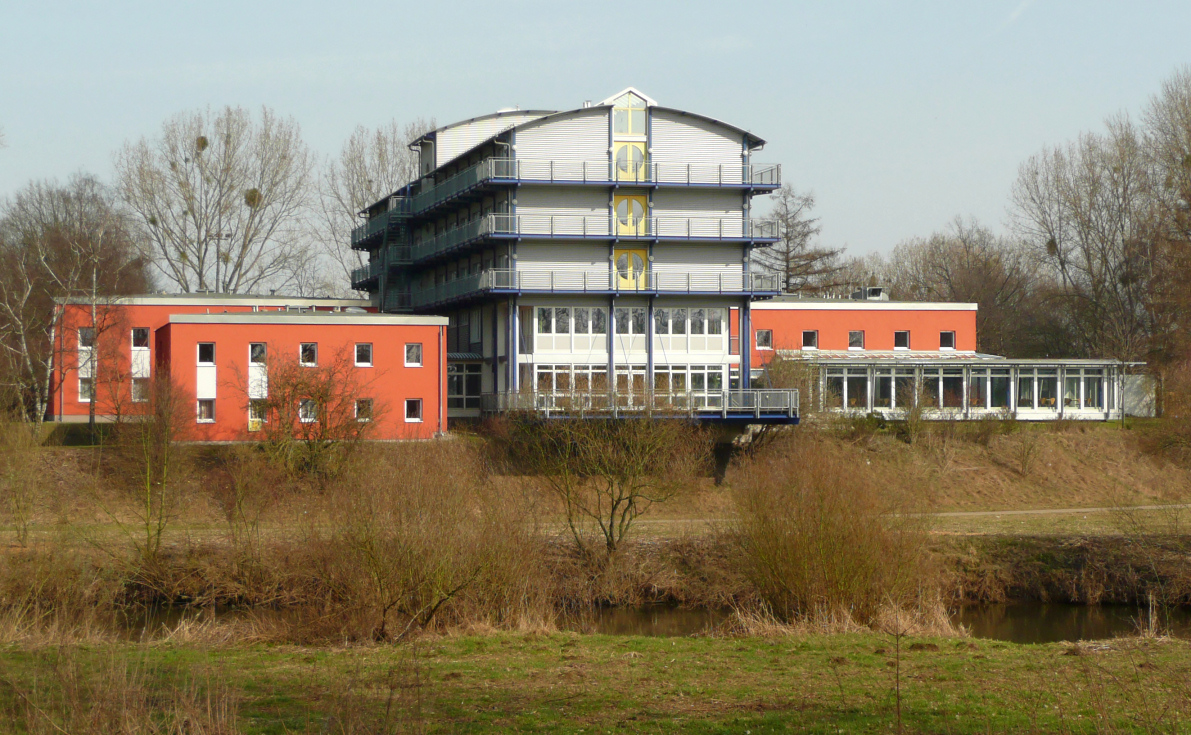 Jugendherberge Hannover